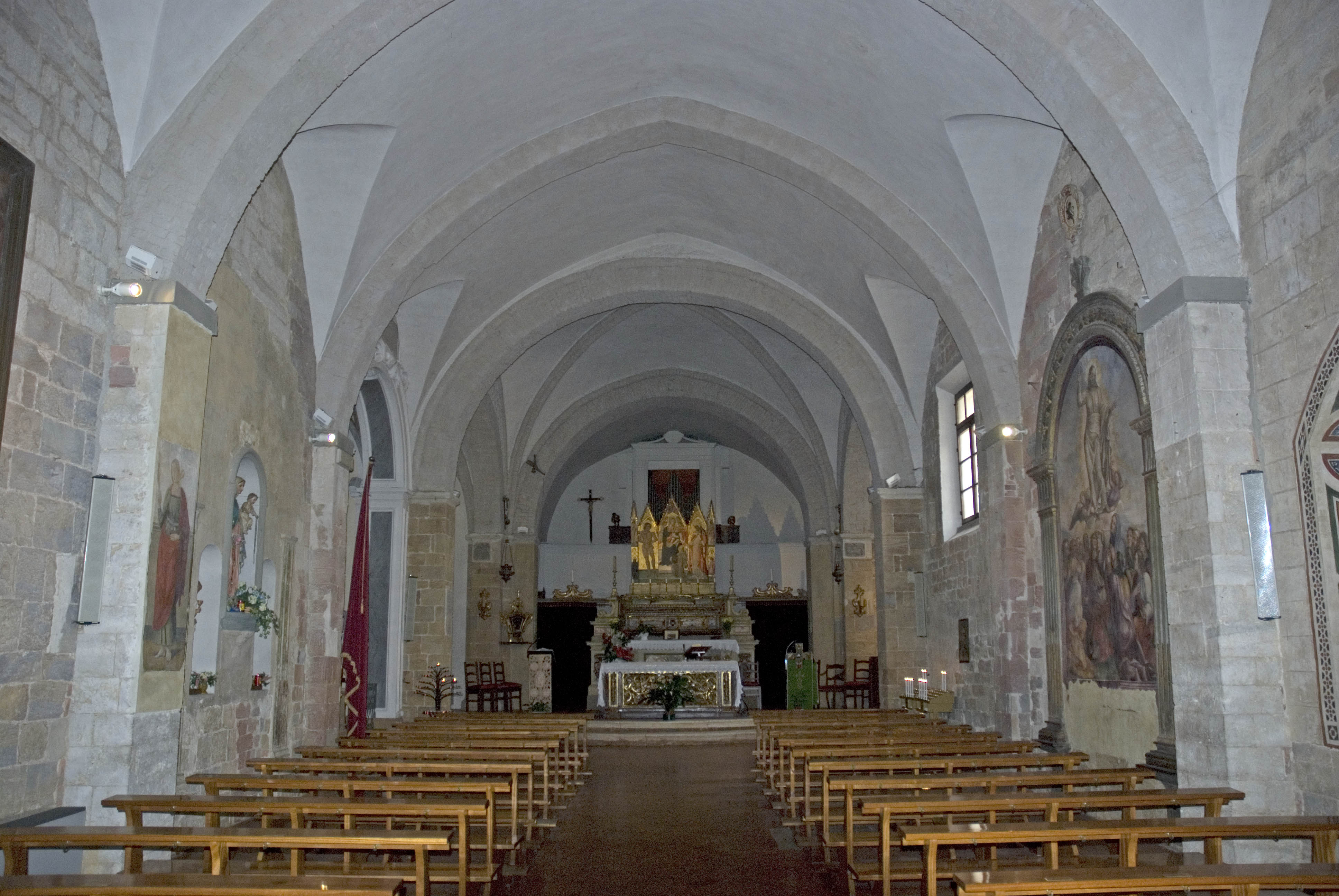 interno della chiesa di trequanda